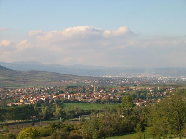 photo du village d'Orcet